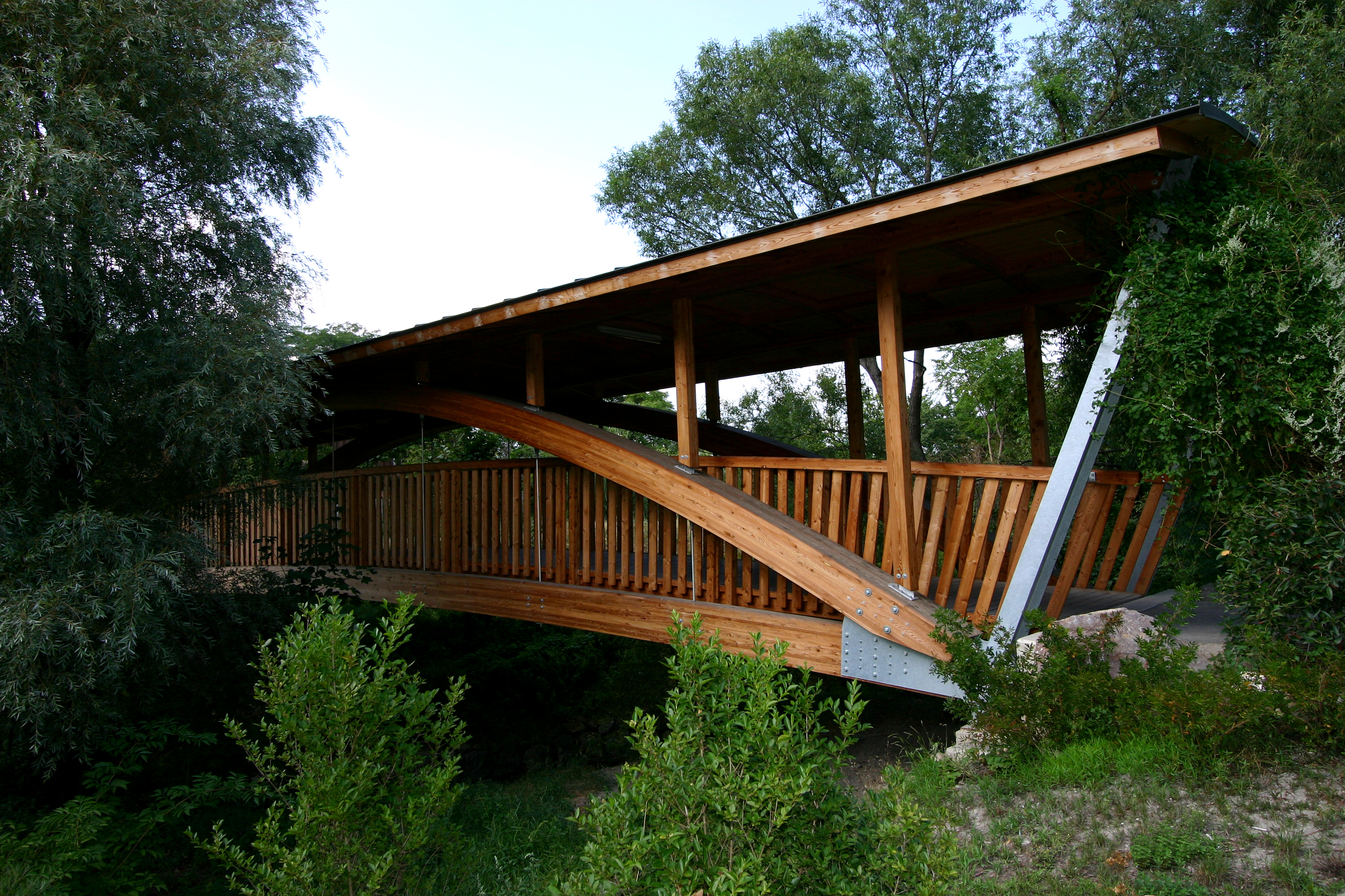 Brücke Lindenweg in Wr. Neudorf. Sie wurde von der Tiefbauabteilung der HTL Mödling im Rahmen einer Diplomarbeit 2005 geplant und gebaut. Es handelt sich um Fußgeher und Radwegbrücke mit einer Spannweite von 20m.